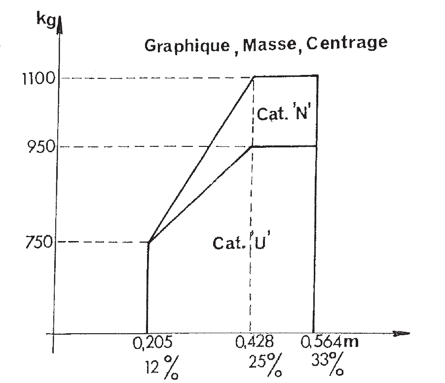 Centrogramme Robin DR400